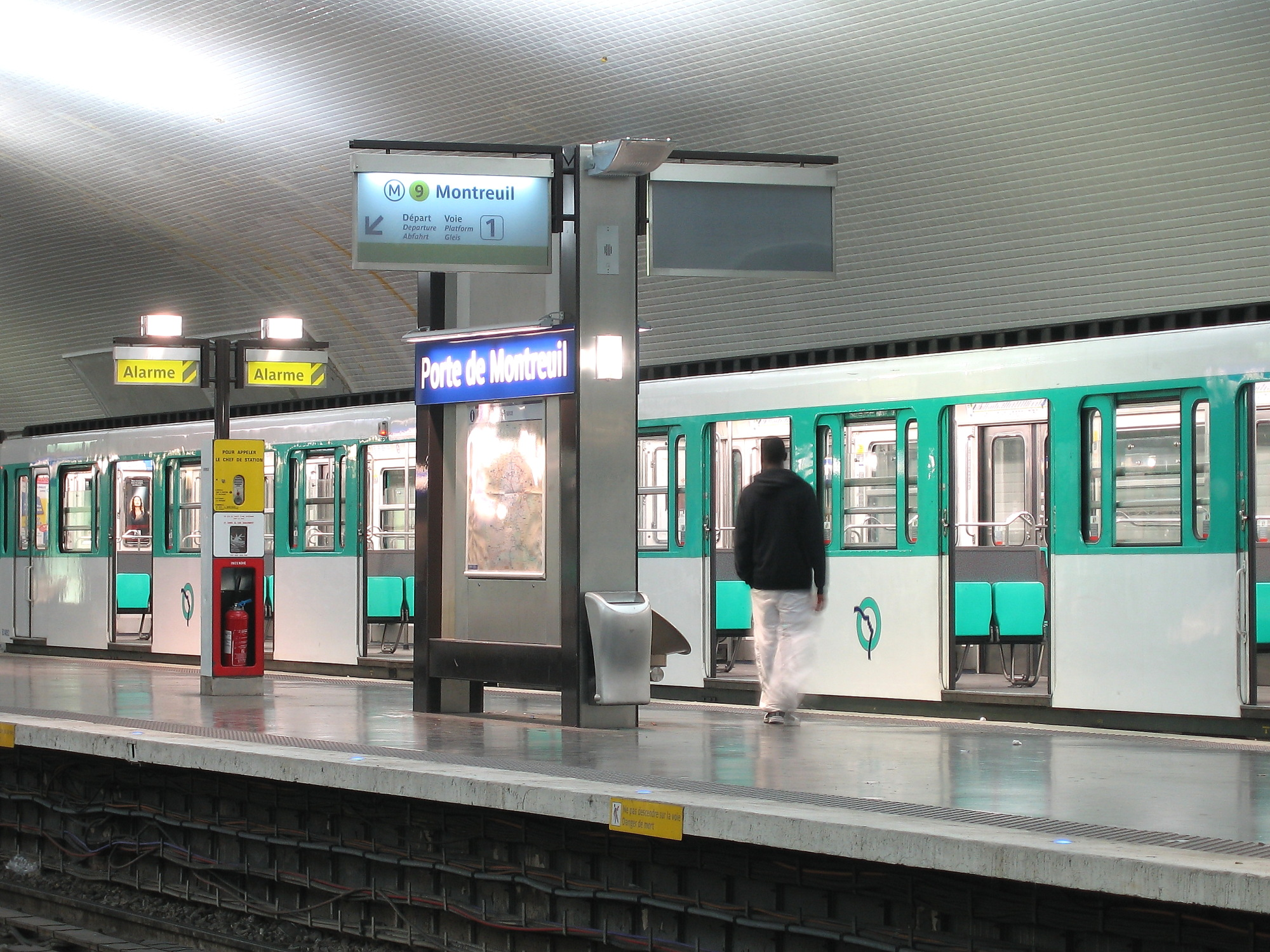 Quai à destination de "Montreuil" (en réalité "Mairie de Montreuil") de la station du métro parisien Porte de Montreuil.